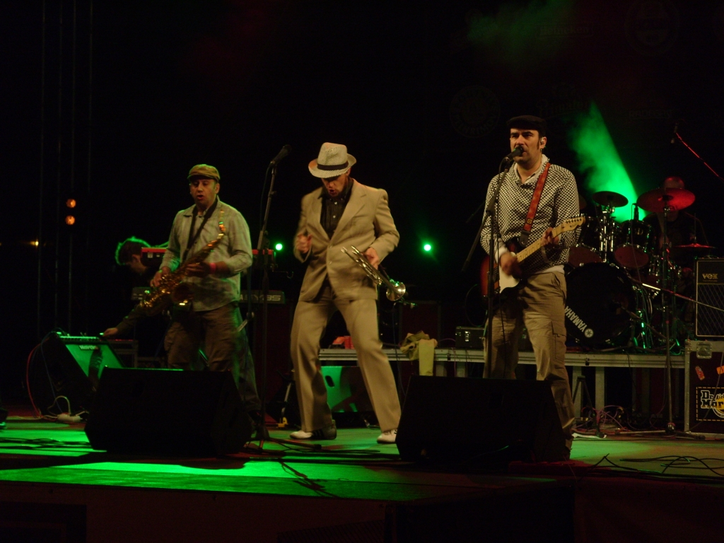 Polemic na olomouckém Beerfestu